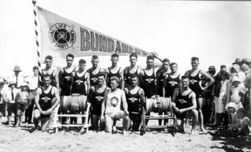 Bundaberg Surf Life Saving Club members, Nielson Park, Burnett Shire, c 1931